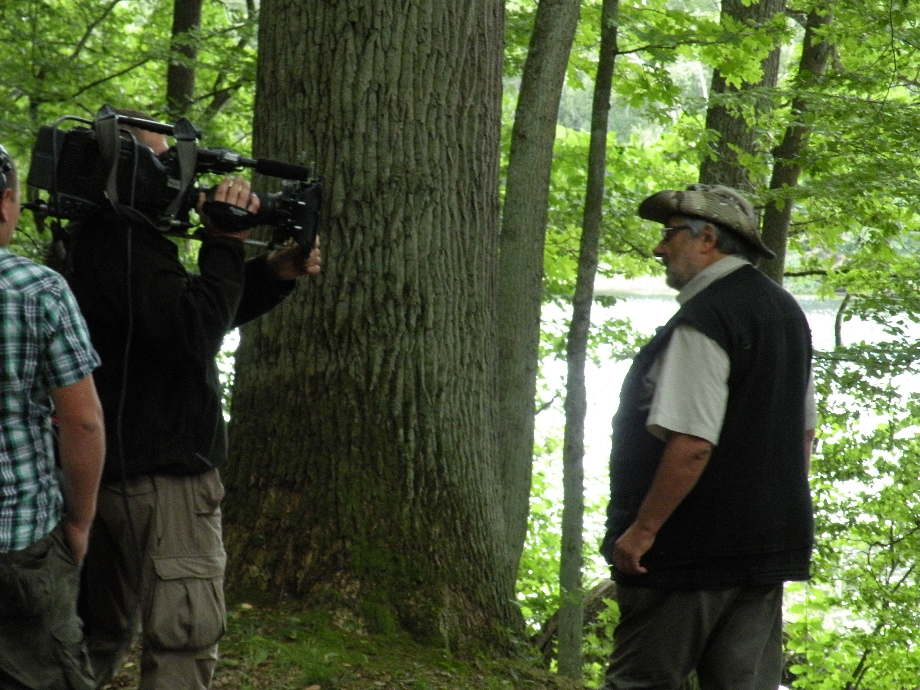 Ekipa filmowa programu Dzikiej Polski w trakcie filmu o chruścikach, lipiec 2013, Rezerwat Las Warminski.